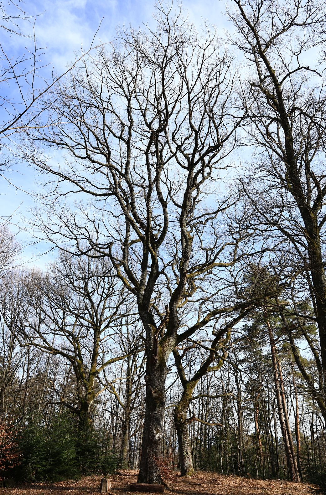 De magnifiques chênes centenaires.